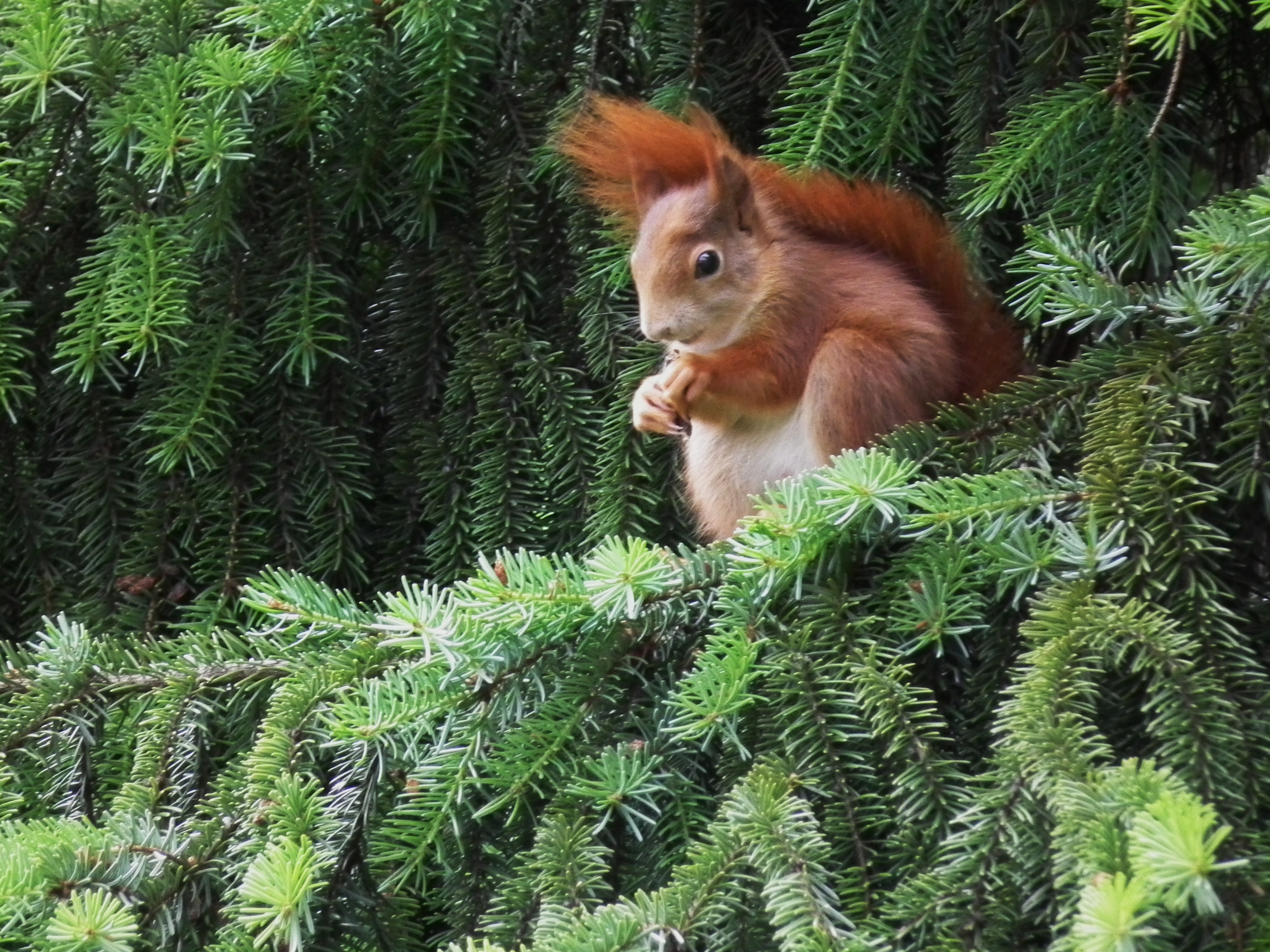 Europäisches Eichhörnchen (Sciurus vulgaris) in einer Gemeinen Fichte (Picea abies), fotografiert in Plankstadt (Baden-Württemberg, Deutschland)